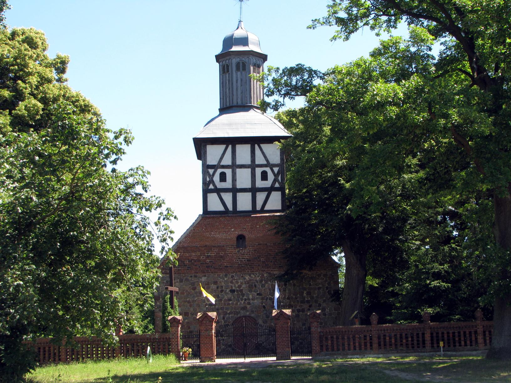 Kościół w Wojcieszycach. Widok od strony zachodniej.